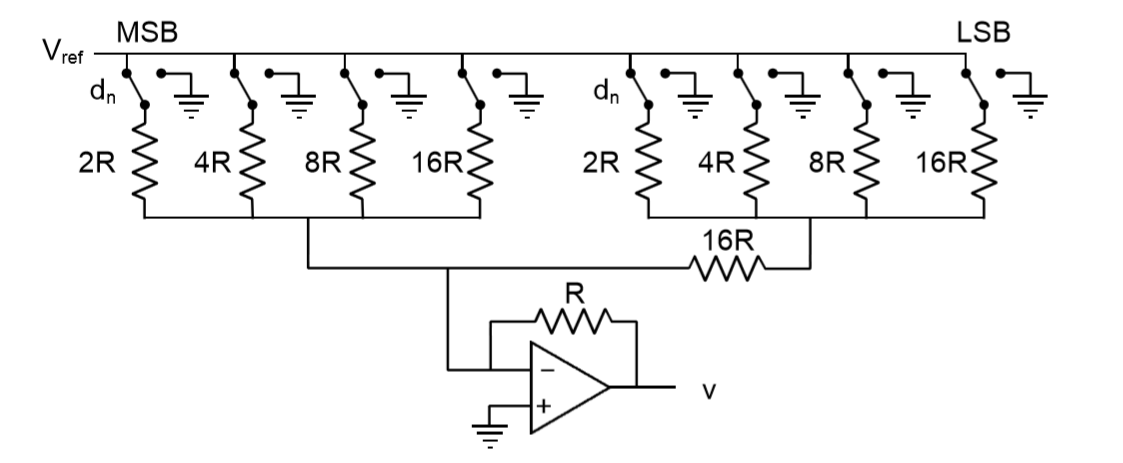 DAC red escalera. Cada llave corresponde al valor binario en la salida de un circuito digital. Las corrientes se adicionan en la entrada inversora del amplificador diferencial.